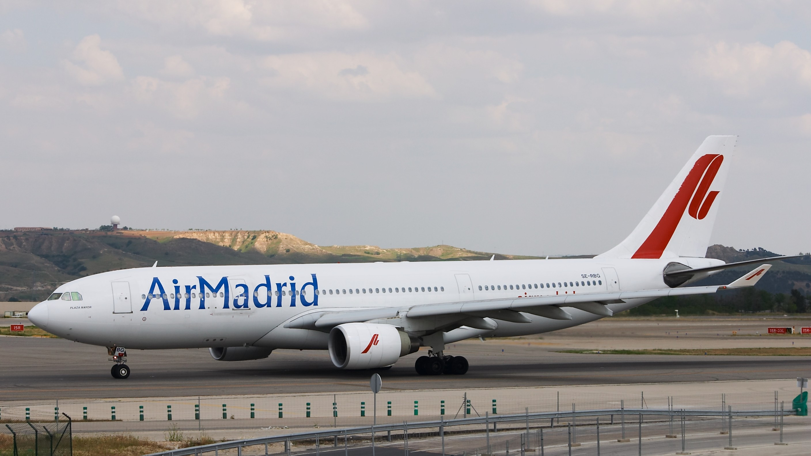 Airbus A330-223 de Air Madrid rodando para despegar. Aeropuerto de Madrid Barajas.